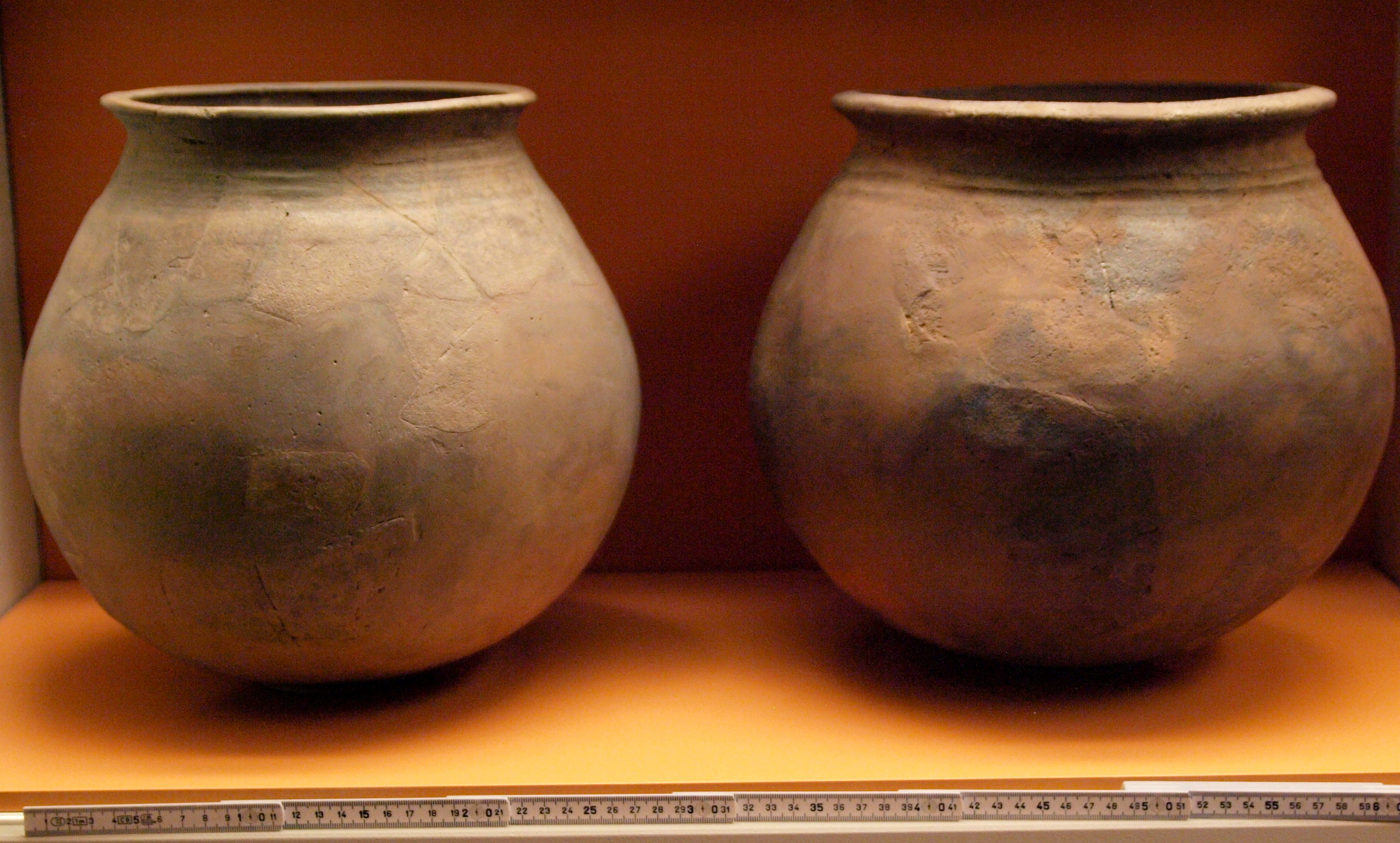 Zwei mittelalterliche Kugeltöpfe aus Schleswig. Restauriert und teilweise Ergänzt. Fotografiert im Archäologischen Landesmuseum Schleswig-Holstein Schloss Gottorg, Schleswig.